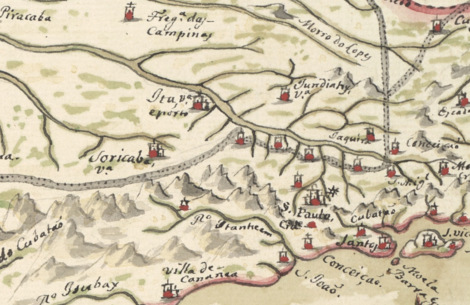 Trecho paulista do Caminho das Tropas no Guia de Caminhantes (1817) de Anastácio Santana.